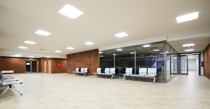 Vnitřní prostory budovy Fakulty elektrotechniky a komunikačních technologií Vysokého učení technického v Brně na Technické 10.